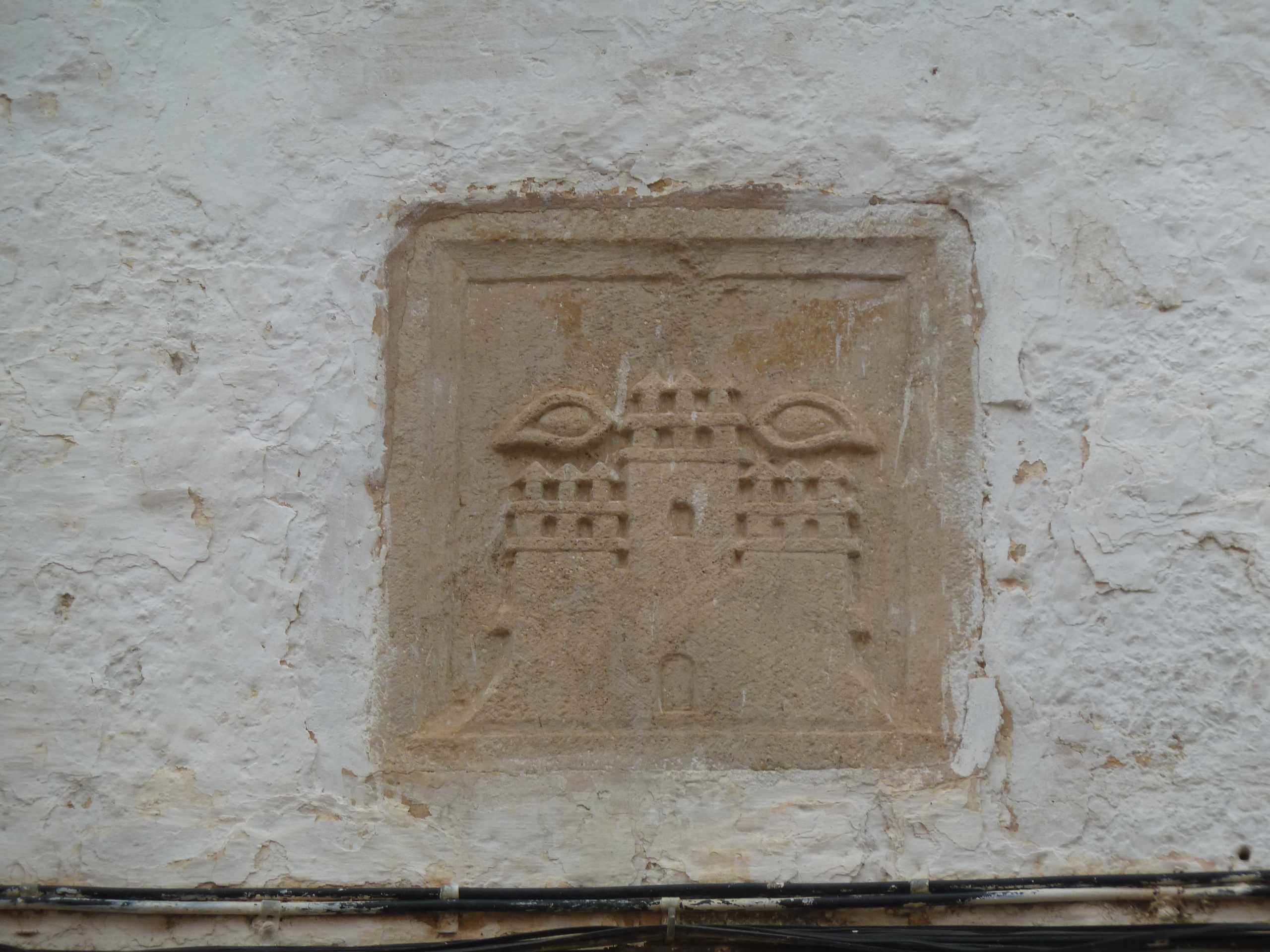 Ulldecona